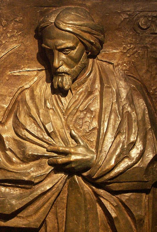 Płaskorzeźba Cypriana Kamila Norwida w Katedrze na Wawelu, fot. Andrzej Barabasz 10.06.2004 r. Attribution-ShareAlike 2.0